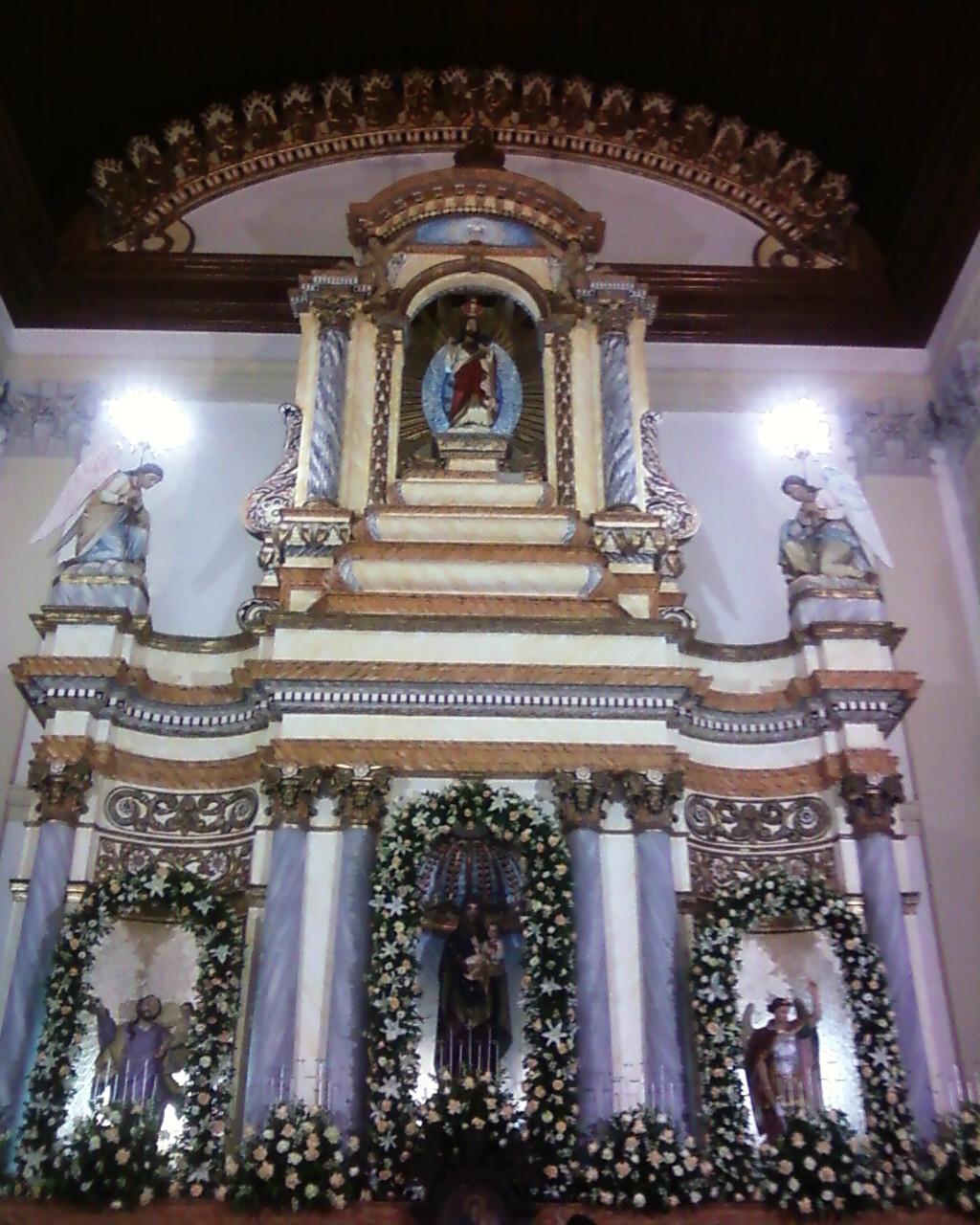 Altar-mor do interior da Catedral Basílica de Nossa Senhora das Neves, em João Pessoa. Paraíba, Brasil.